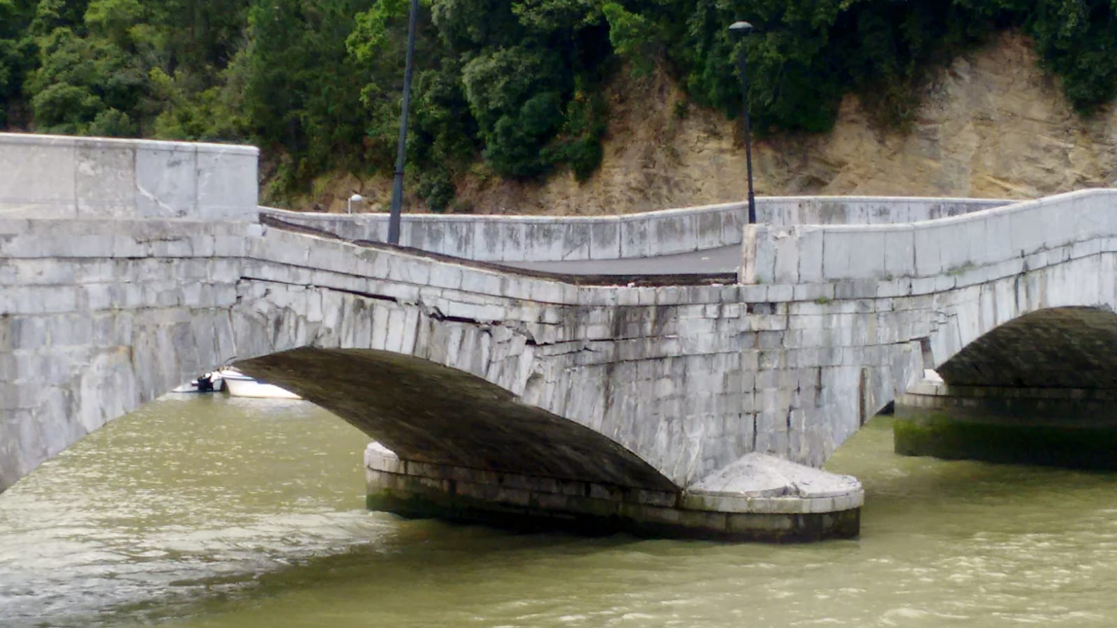 Debako zubiaren zati bat hondoratuta 2018ko uztailaren 5ean. Argazkia eguardiko 12:30etan ateratakoa da.